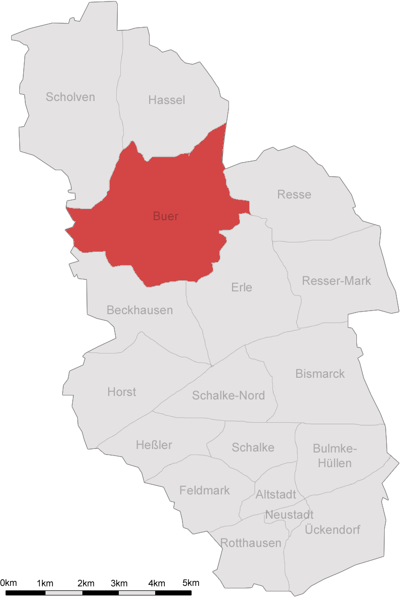 Beschreibung: Selbst erstelle Karte von Gelsenkirchen mit den 18 Stadtteilen und Buer mit roter Makierung. Description: Self-provided map of Gelsenkirchen with its 18 quarters and the red marked quarter Buer. Quelle/Source: Selbst erstellt / Self-provided